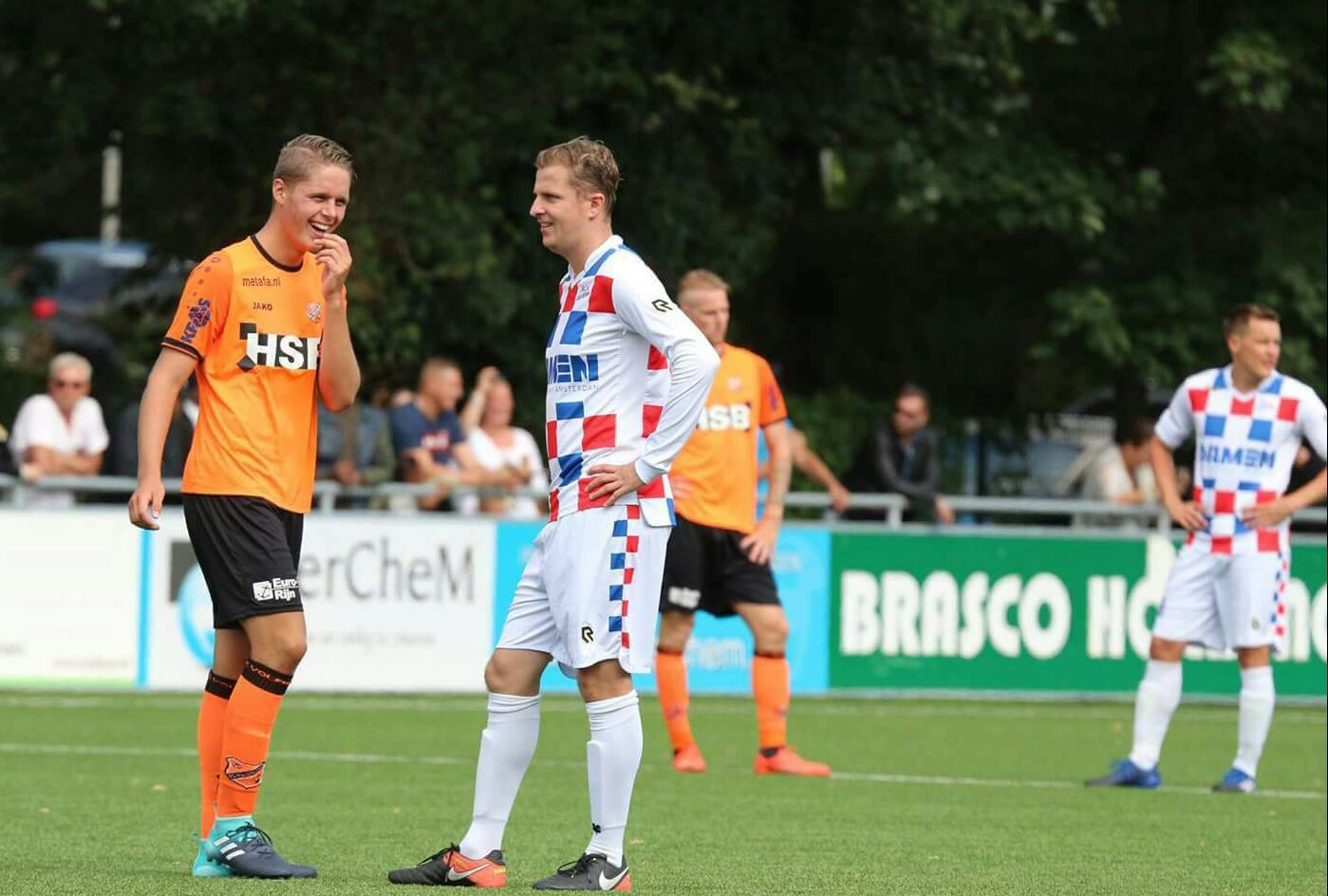 Fotograaf: Frank Fotograaf Brussel / PéSide